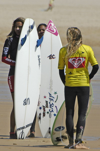 Campeonato do Mundo Junior Surf 2007 - ISA # Quiksilver ISA World Junior Surfing Championship# Praia da Mata - Costa da Caparica - Almada - Portugal 2007 # Heats Under 18